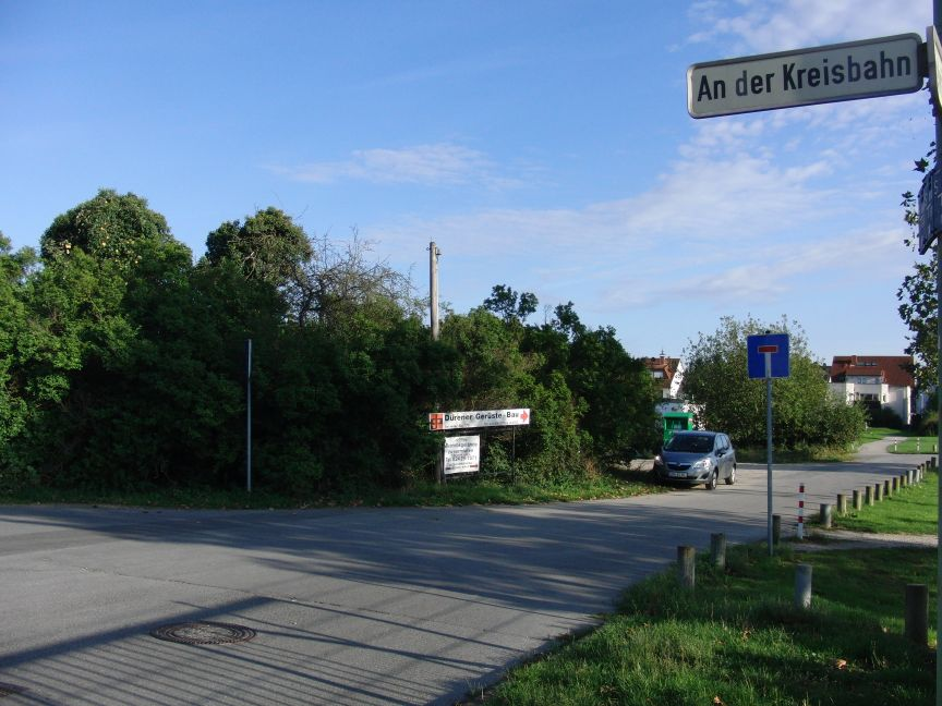 Ehemaliger Bahnhof Birkesdorf-Süd des DKB